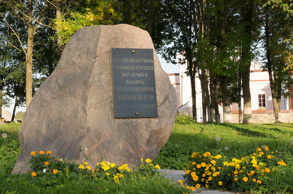 Памятны знак Змітраку Бядулю